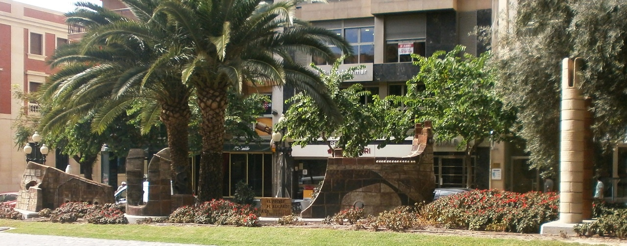 Monumento del pueblo de Alicante a la Constitución Española realizado en 1986 por el artista español Arcadio Blasco. La Rambla, Alicante, España.